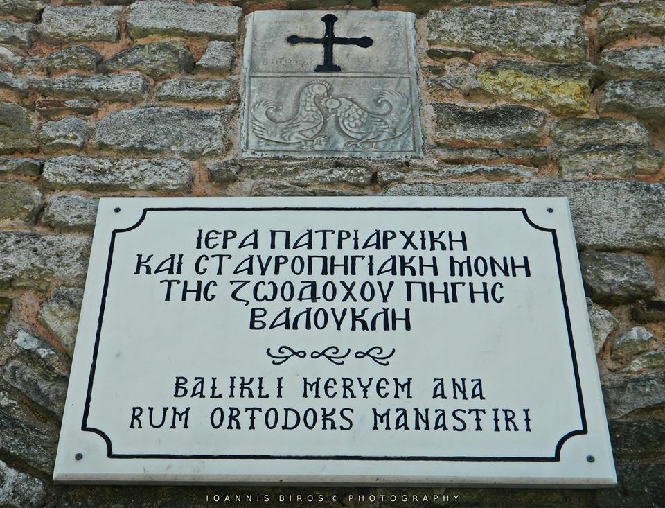 Ζωοδόχος Πηγή του Μπαλουκλή Αγιασμα επιγραφη